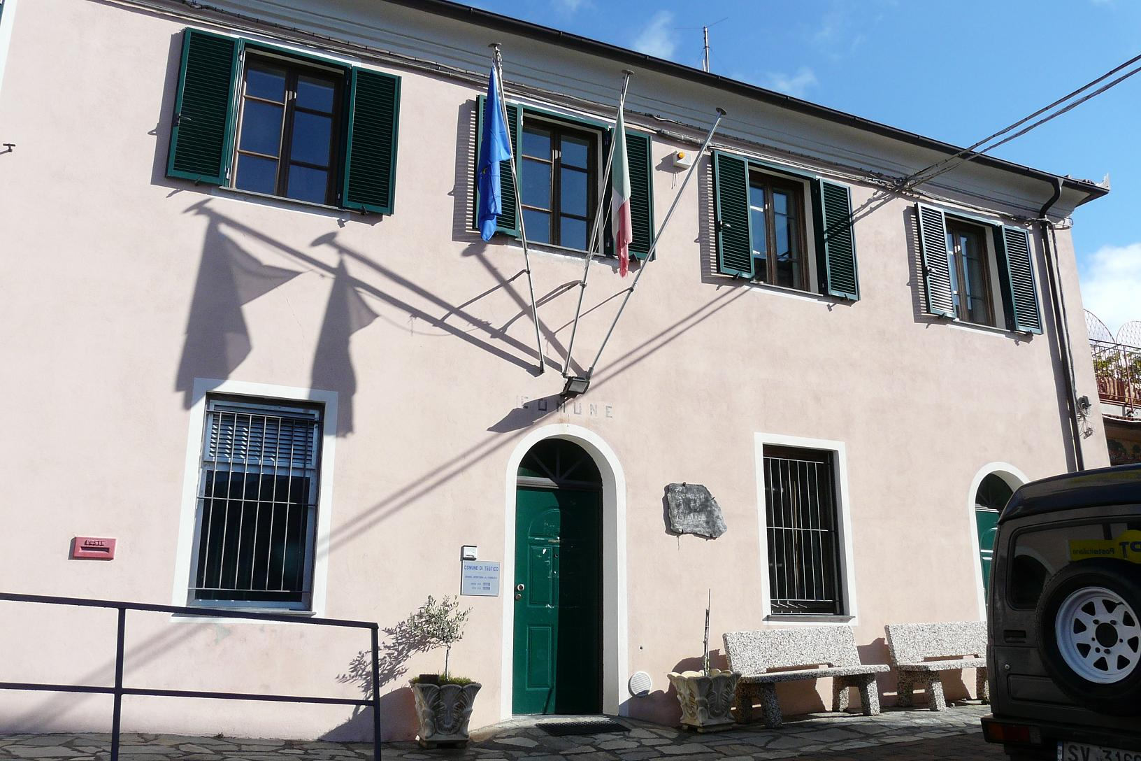 Testico, Liguria, Italia